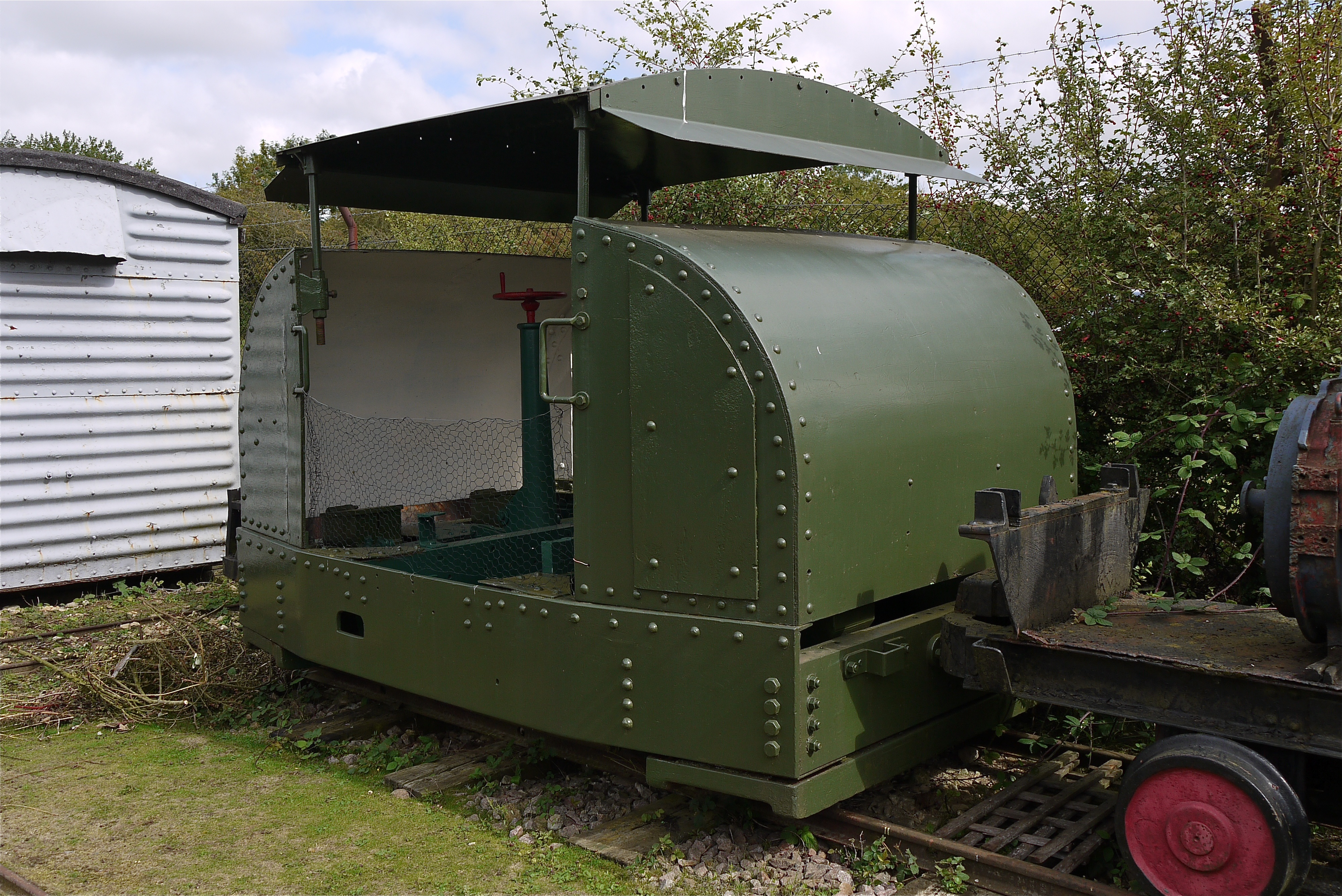 Panasonic G1 14-45 Lens